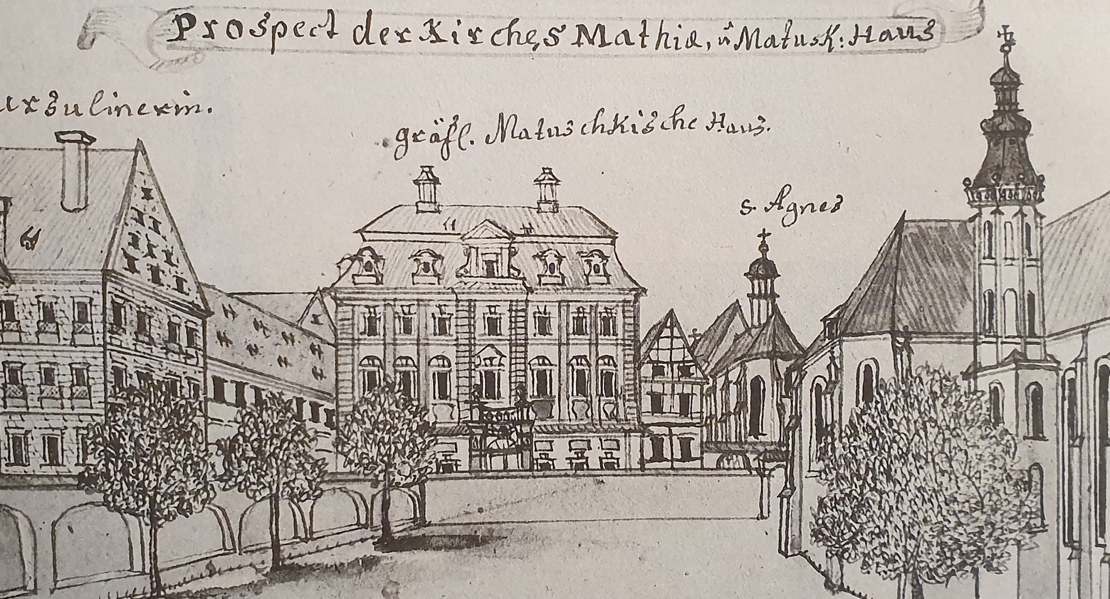 Plac Nankiera we Wrocławiu (fragment), fasada pałacu Hornesów (Matuszków), Grafika Fryderyka Bernarda Wernera, z połowy XVIII wieku, rysunek piórem, 88x166, BU Wrocław